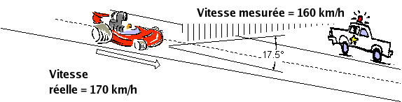 Vitesse relevée par un radar de contrôle routier et vitesse réelle. Comme le radar ne peut noter que la vitesse radiale, la différence est égale à un facteur proportionnel au Cosinus de l'angle.